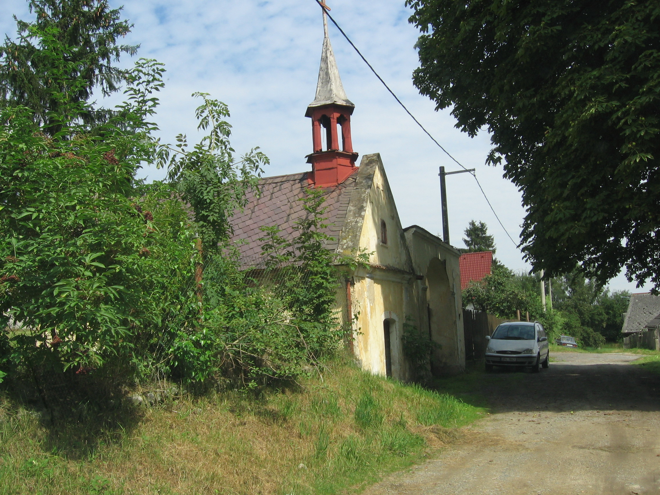 Lužná u Boru, okres Tachov. Kaple Panny Marie, postavená roku 1842 Stefanem Kreinerem na paměť syna, který zemřel na zápal plic. Kaple i se sousedním domem č. p. 8 je v soukromém vlastnictví (Štefan Baláž z Tachova). (